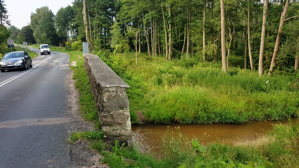 Narusa, warmińsko-mazurskie, droga wojewódzka nr 504 (DW504)